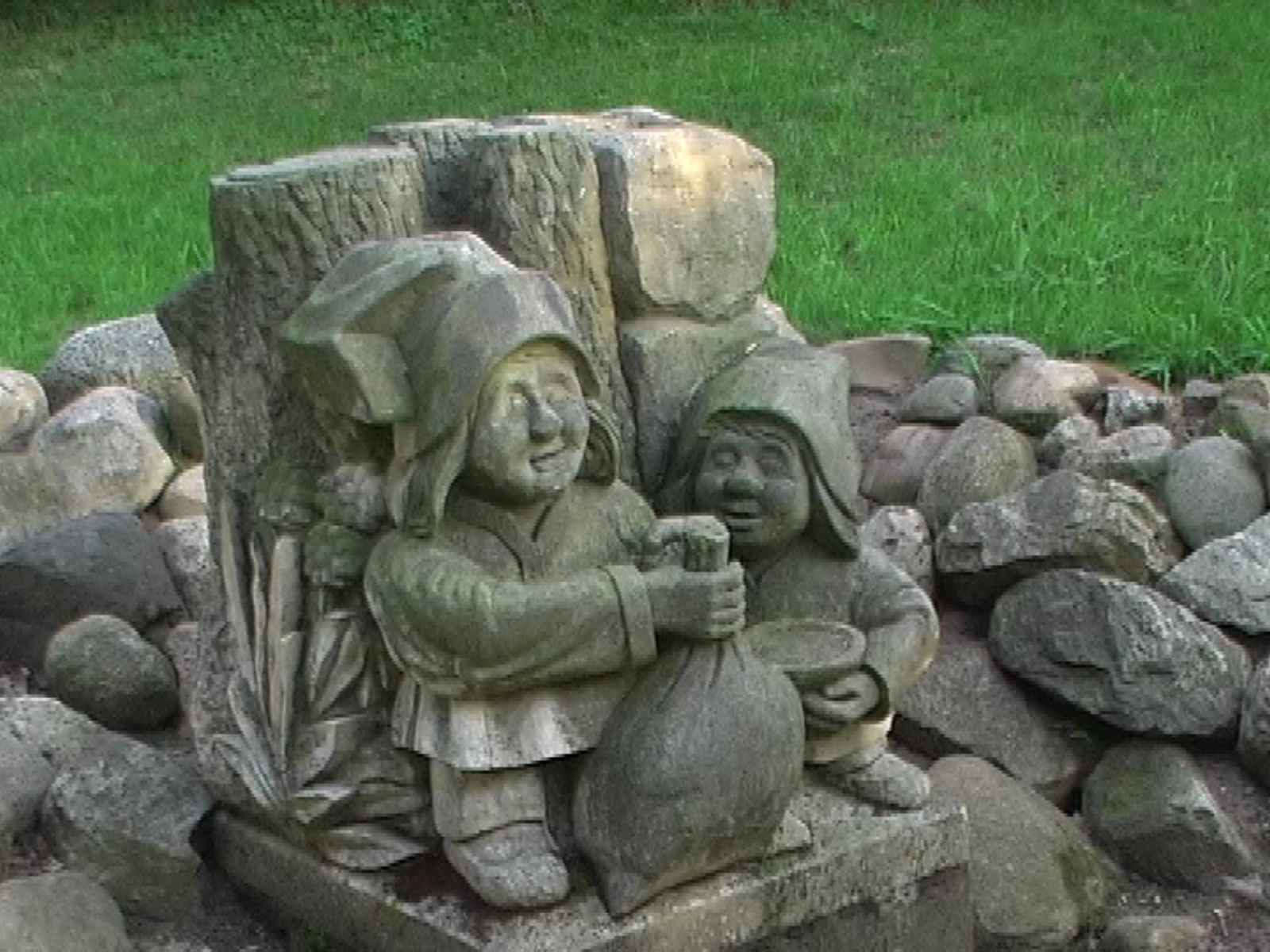 Lutki w lěkowanskim a powěsćowym parku, Borkowy (Błóta)